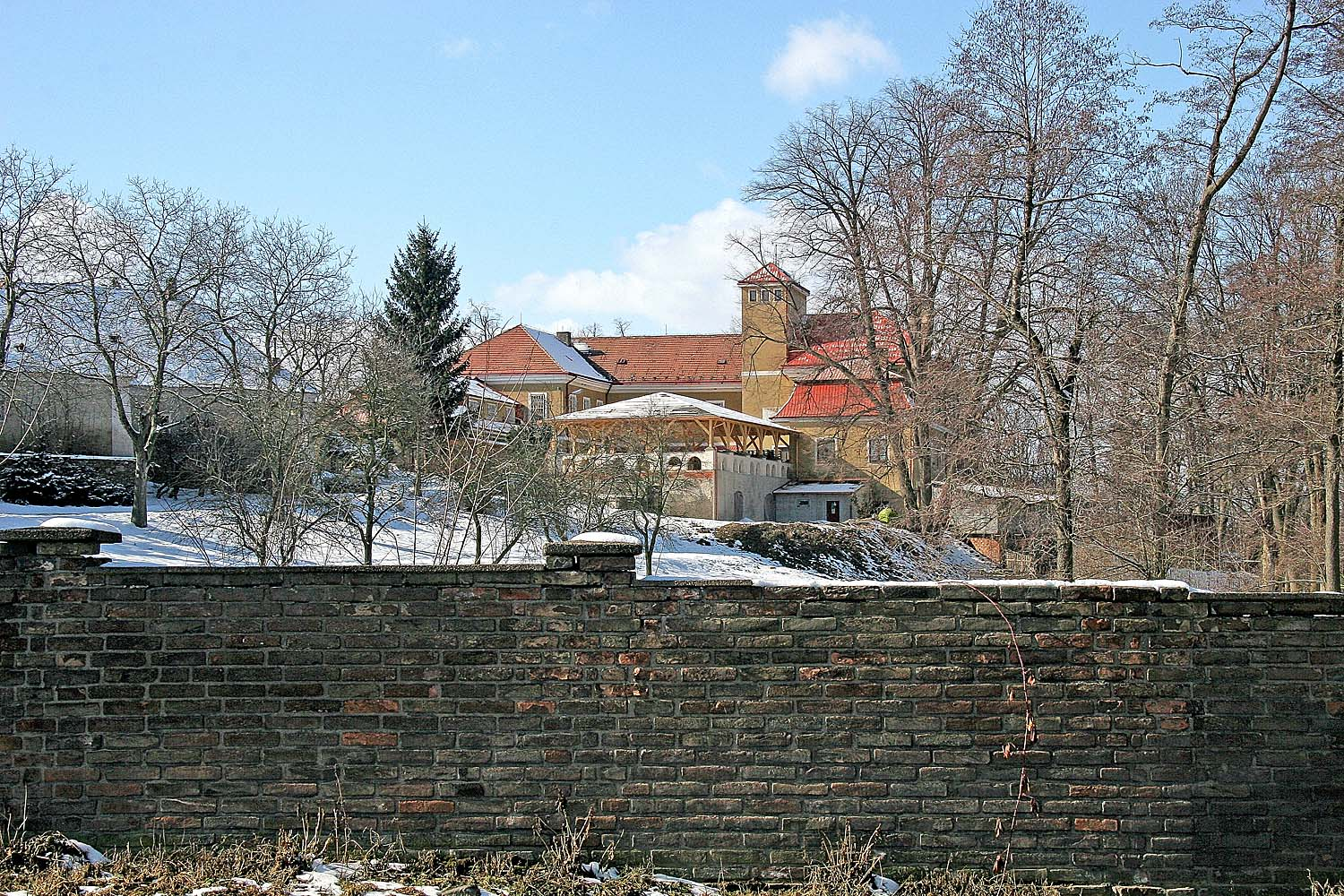 Zámek ve vsi Červený Hrádek (část obce Bečváry), Kolín district autor: Prazak date: 27. 2. 2006